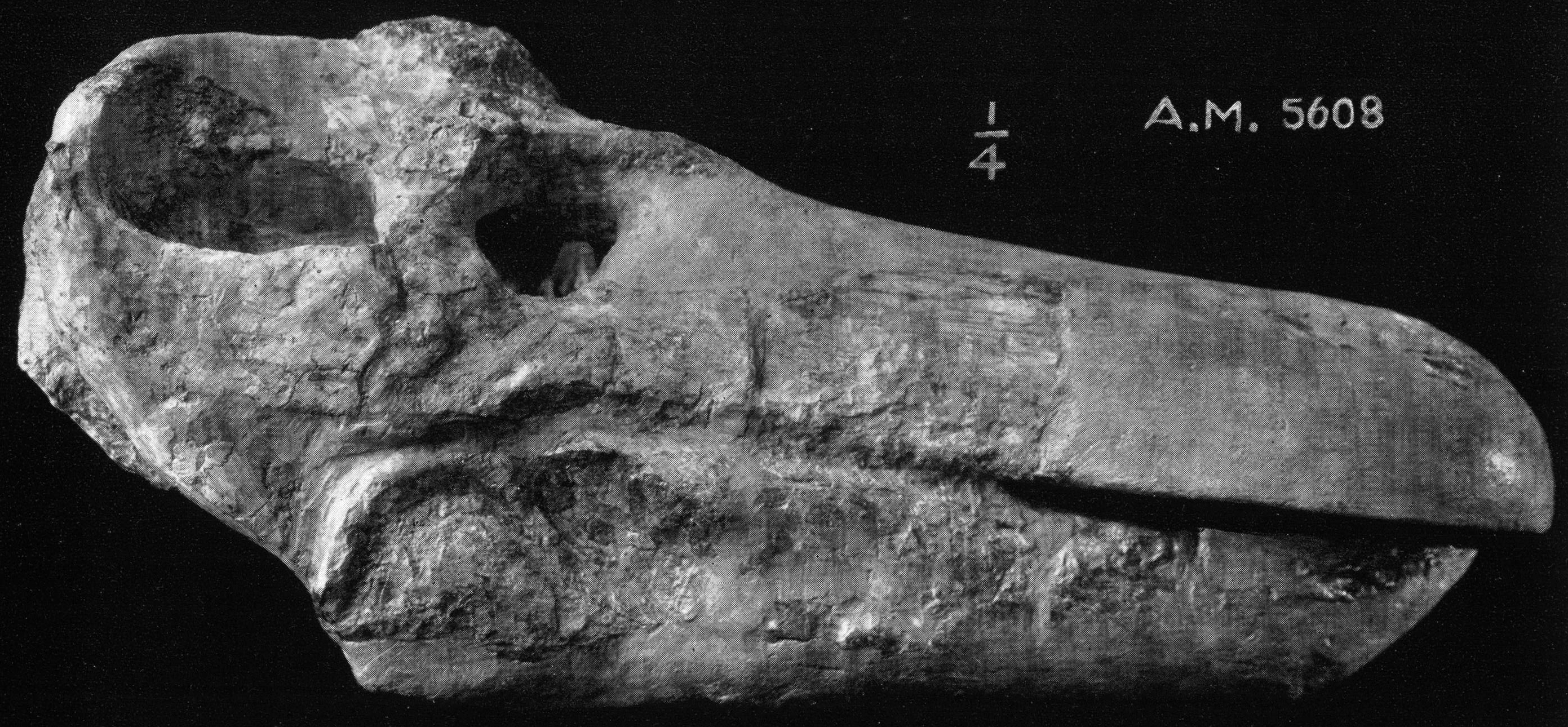 Jonkeria ingens skull, Amer. Mus. No. 5608.